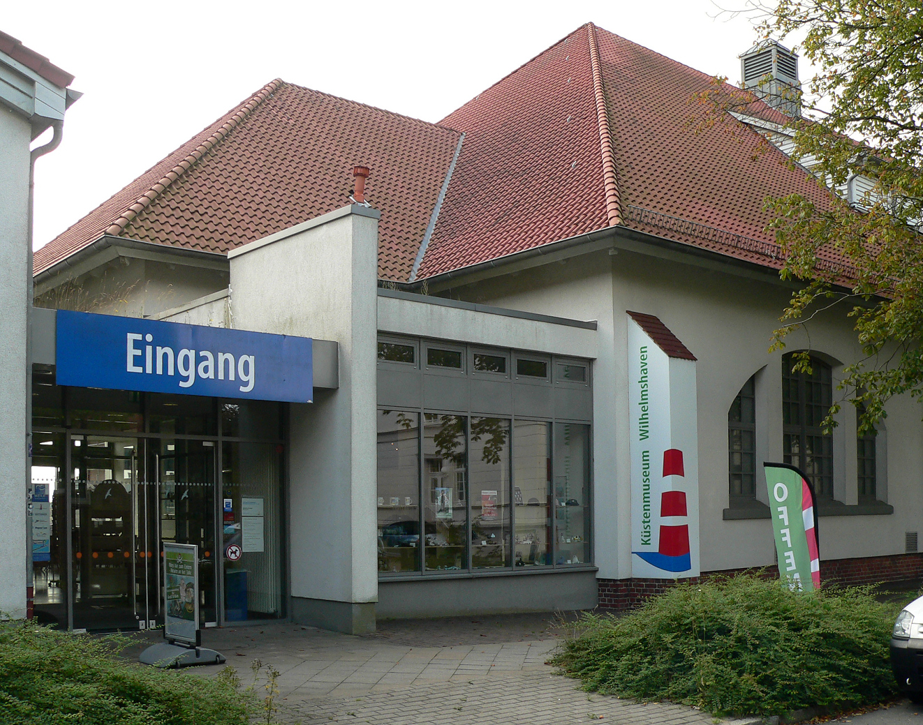 Eingang des Küstenmuseum Wilhelmshaven